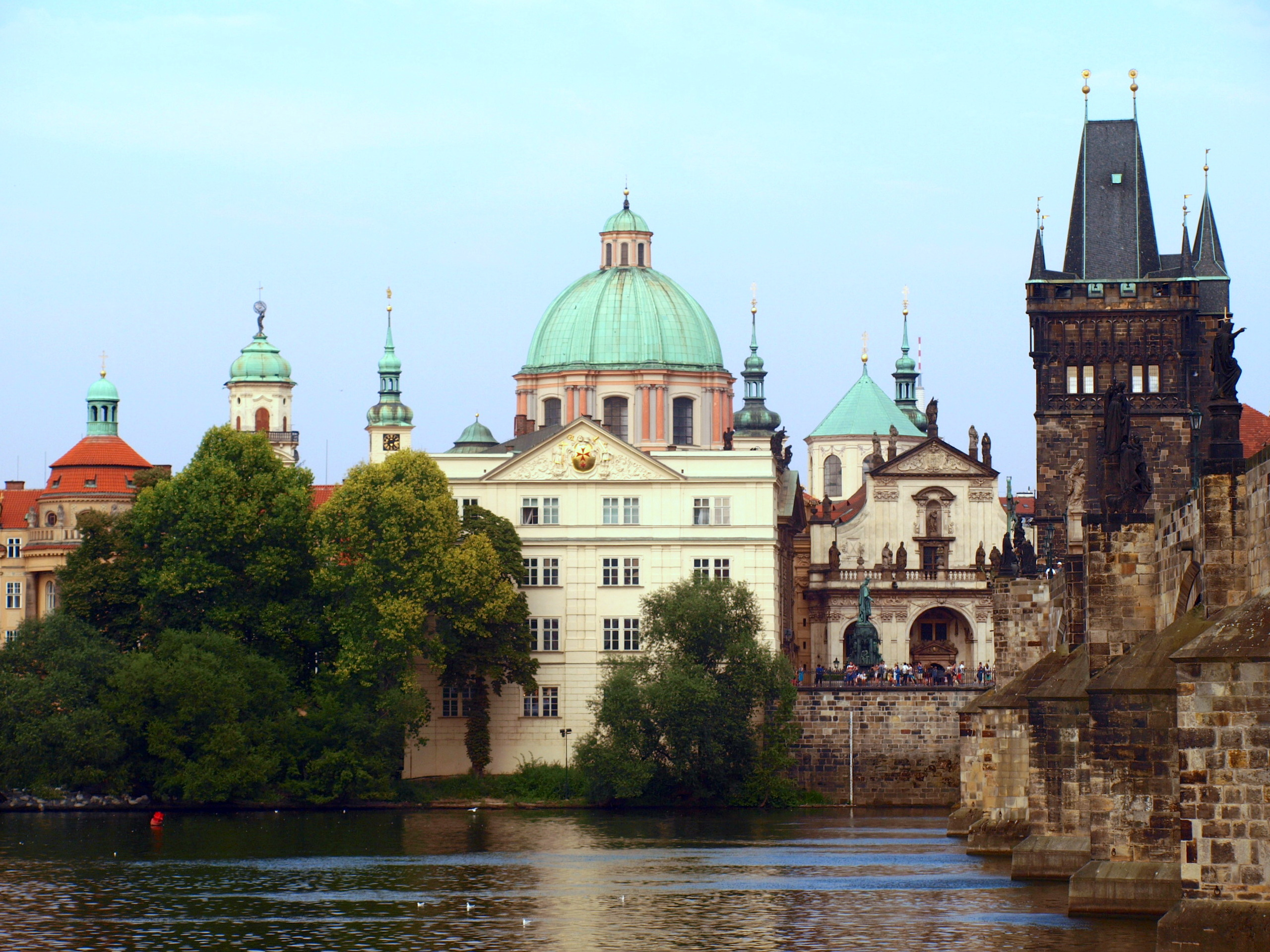 Praha, kostel sv. Františka z Assisi